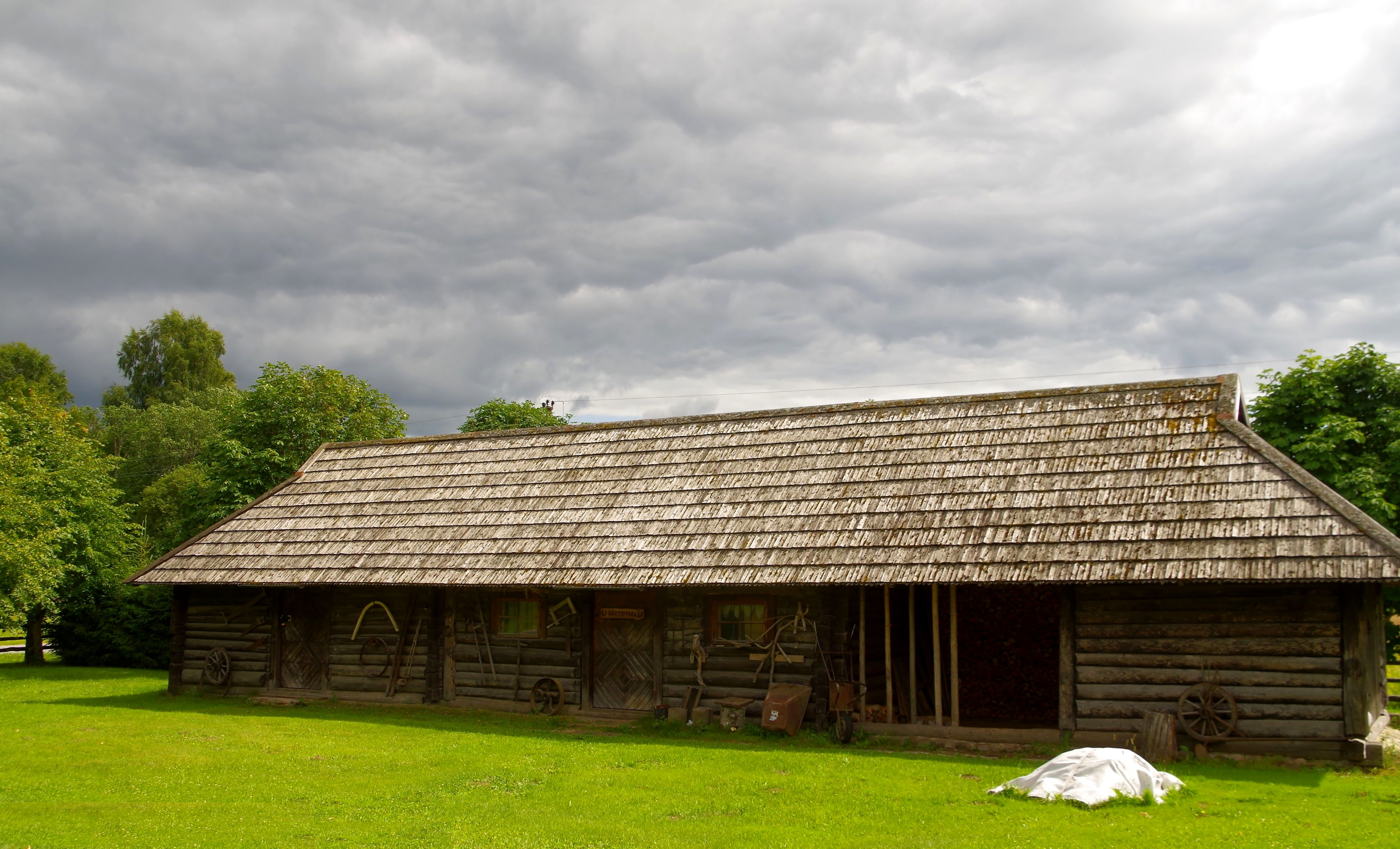 Nõmme kõrtsi kõrvalhoone